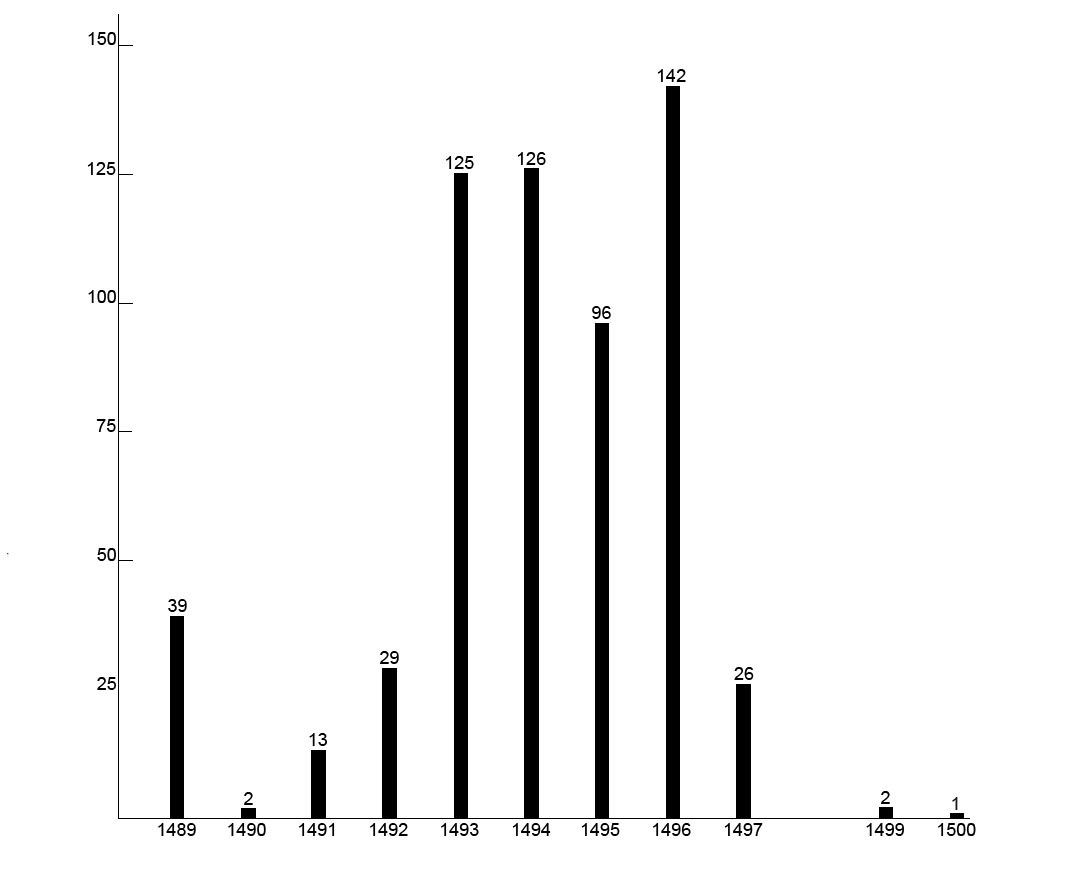 Total de esclavos canarios mercadeados en Valencia